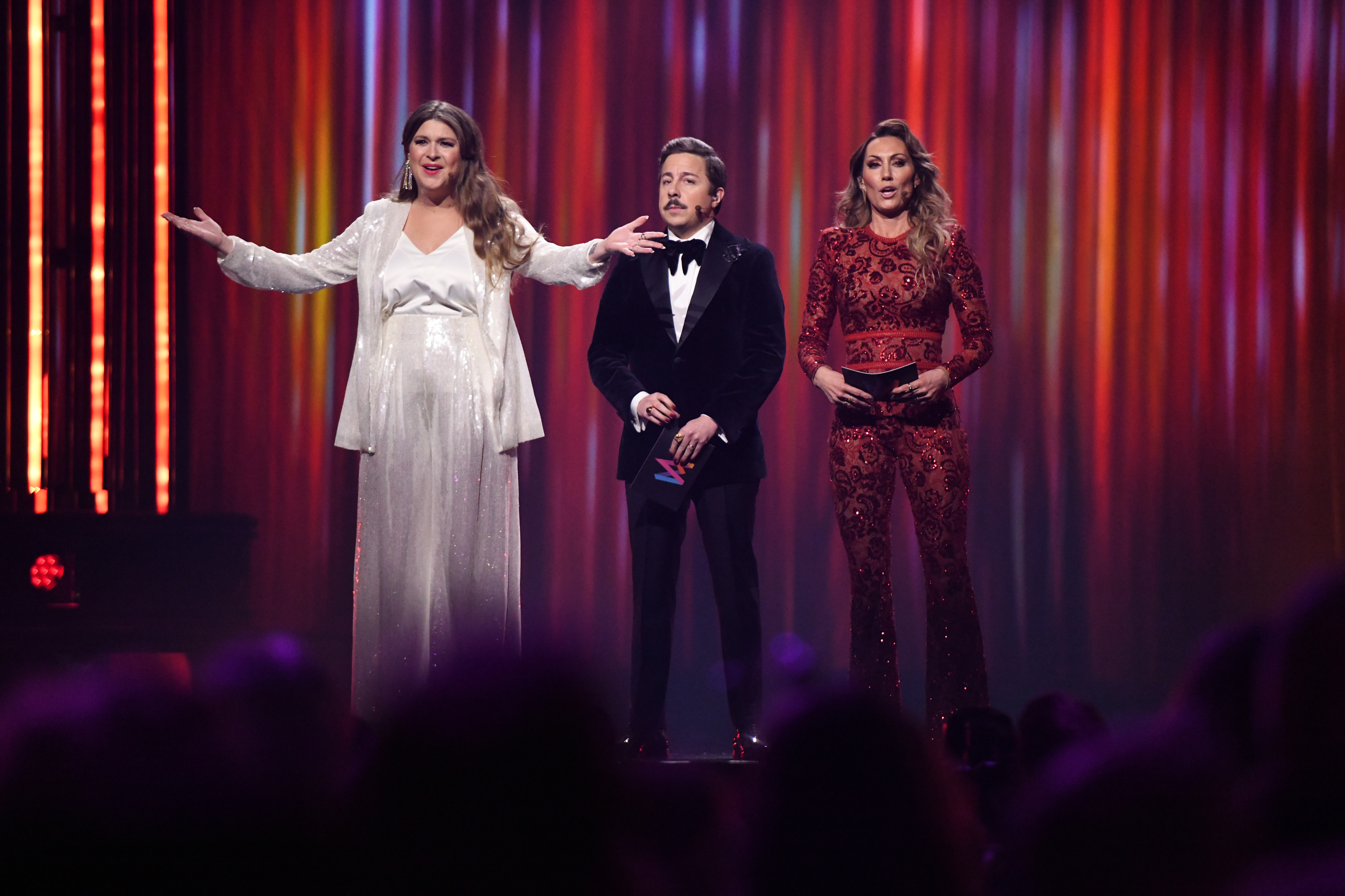 Programledare Melodifestivalen 2020 Linköping publikt genrep